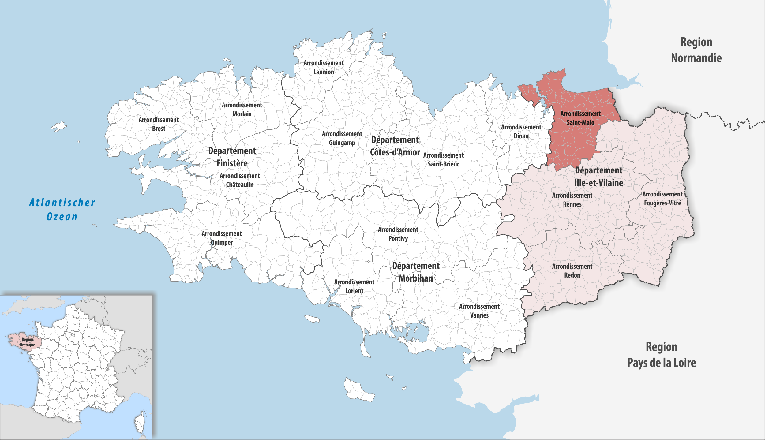 Lage des Arrondissements Saint-Malo